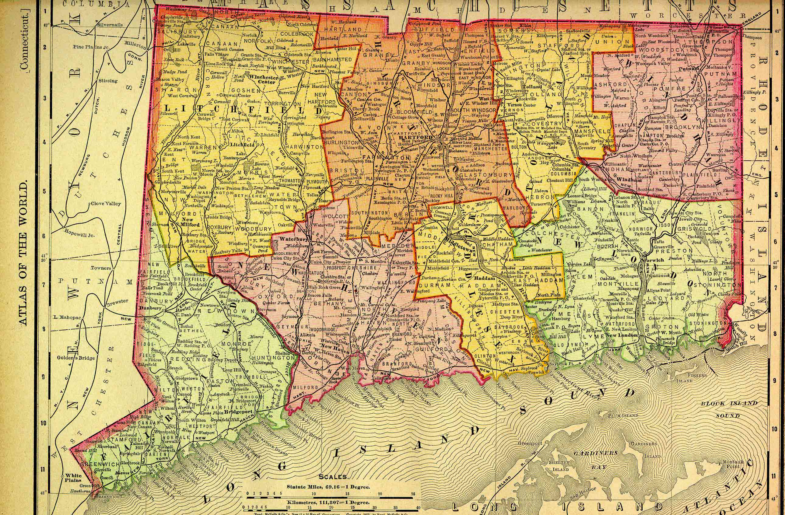 Mapo de Konektikuto.